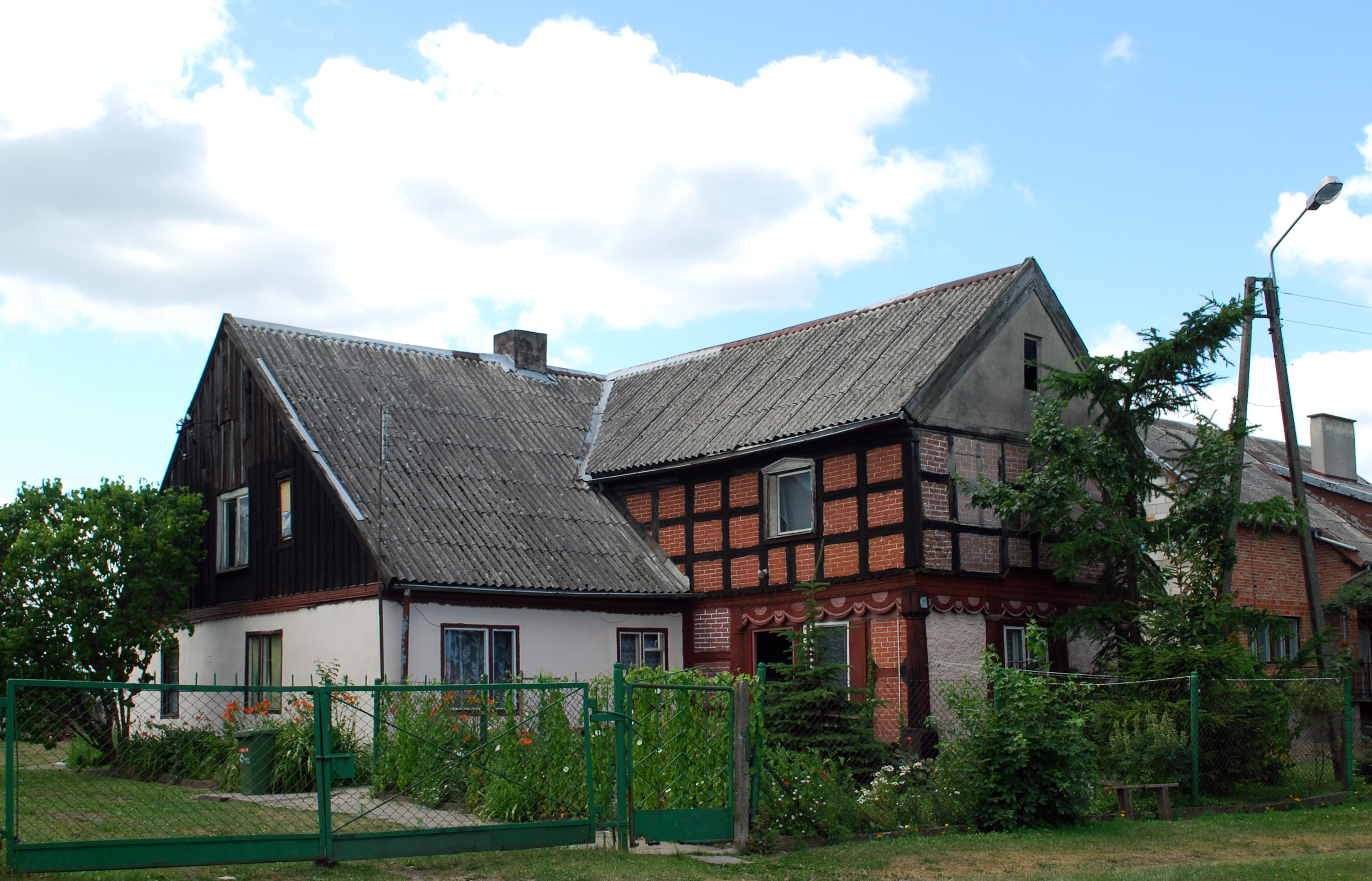 Dawny dom podcieniowy w Osicach